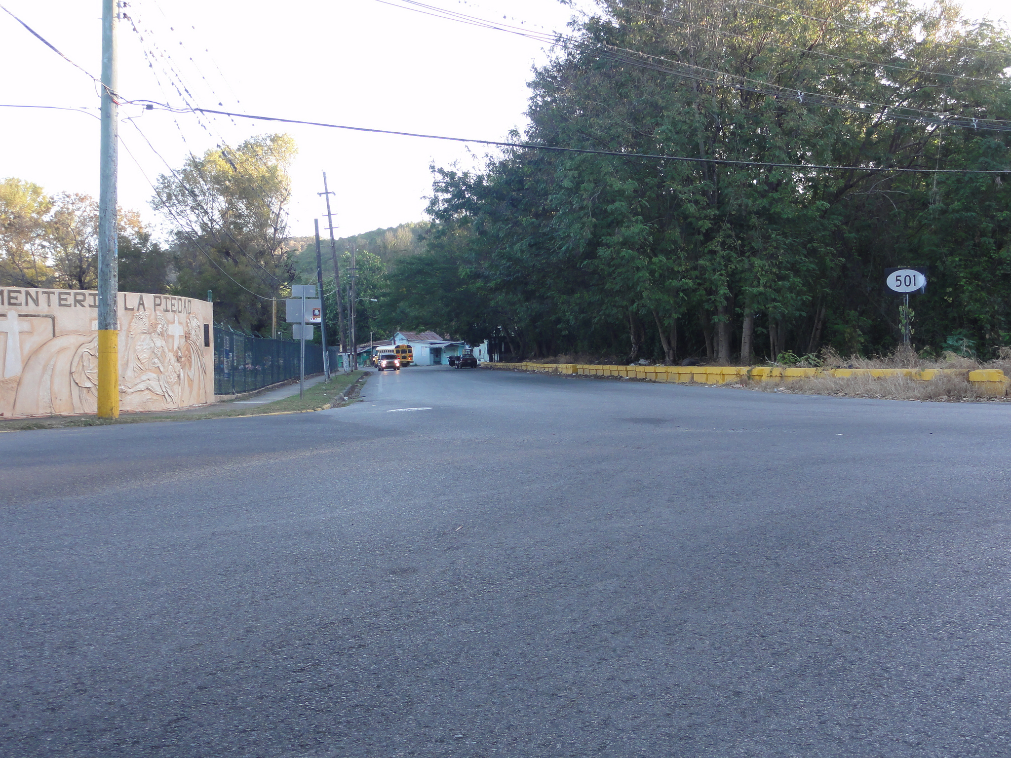 Escena en el Barrio Magueyes, Ponce, Puerto Rico